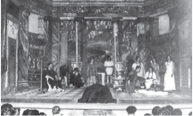 Loreti antzezlana